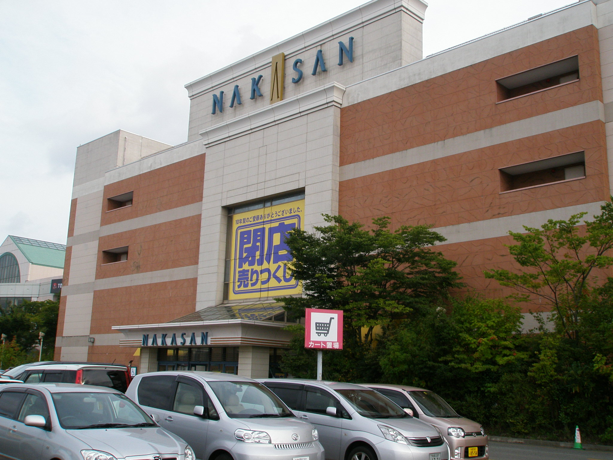 閉店前の中三秋田店。現在はイオンモール秋田ウェストモールとなっている。